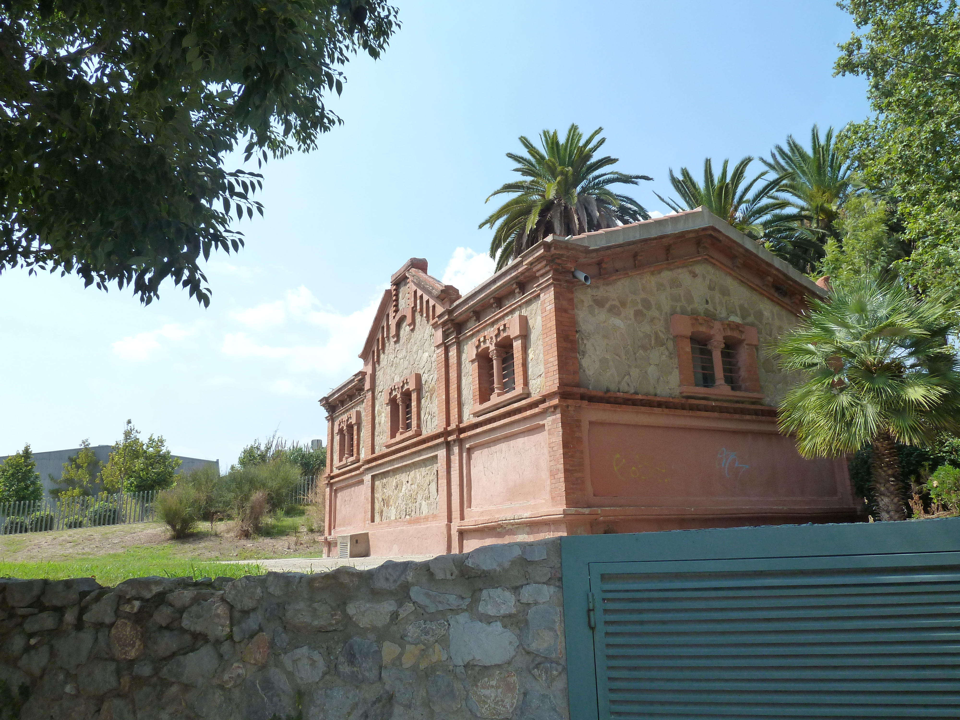 Cornellà de Llobregat (Baix Llobregat).